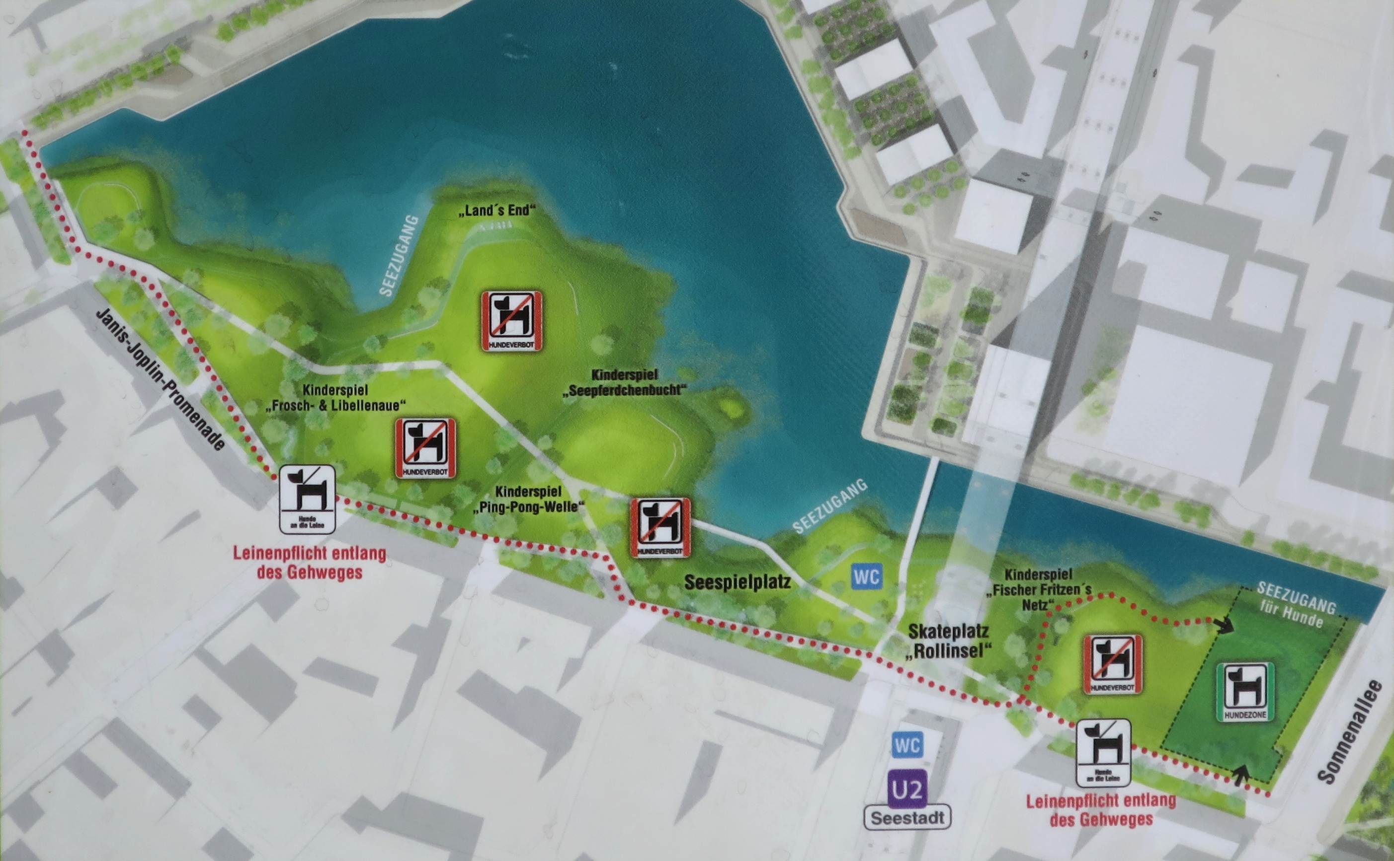 Seepark Aspern in Wien-Donaustadt, permanent installierte Informationstafel